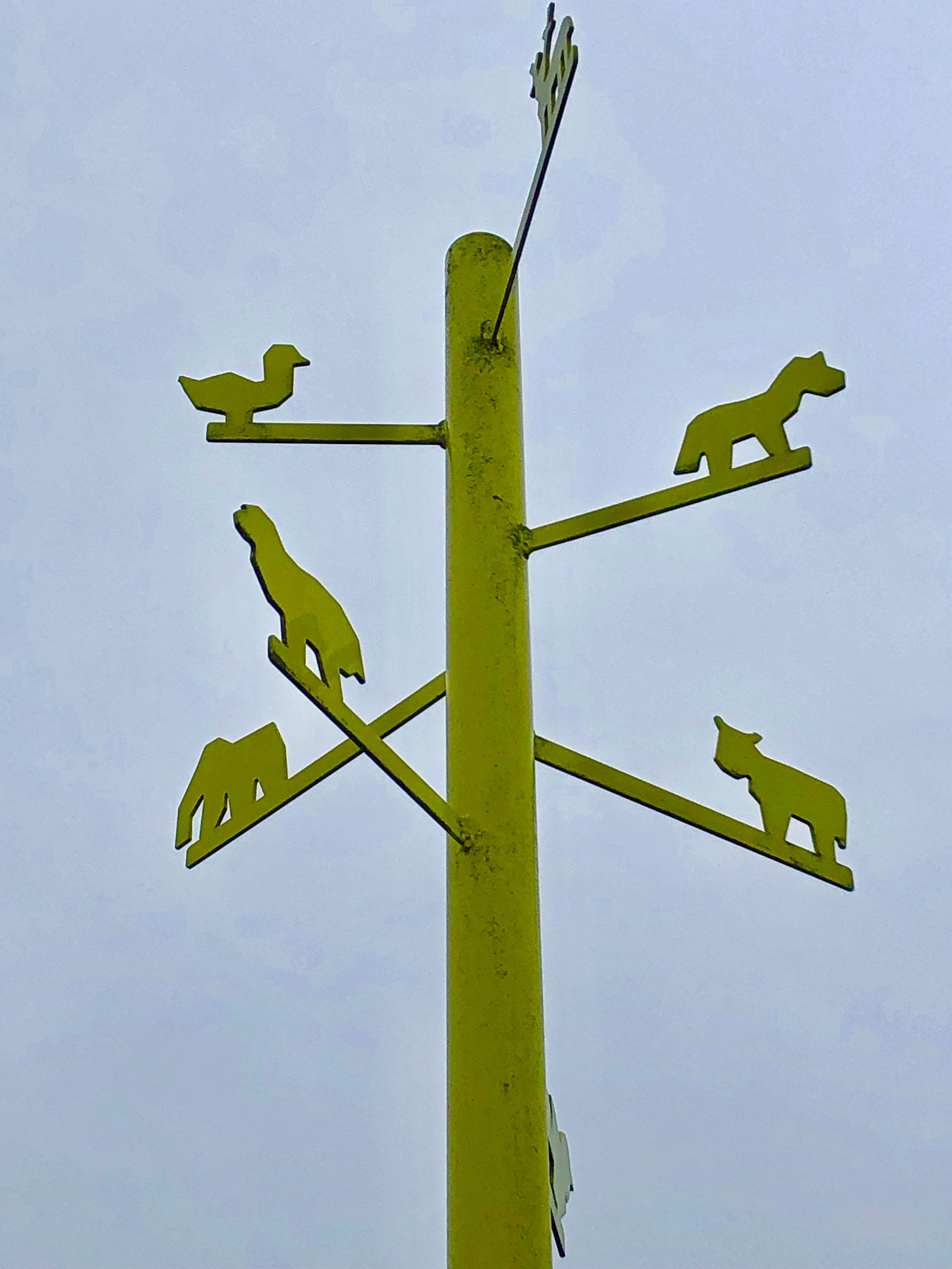 Een van de aangebrachte wegmarkeringen langs de N34 ontworpen door Ineke Hans (ter hoogte van de afslag Gasselte)